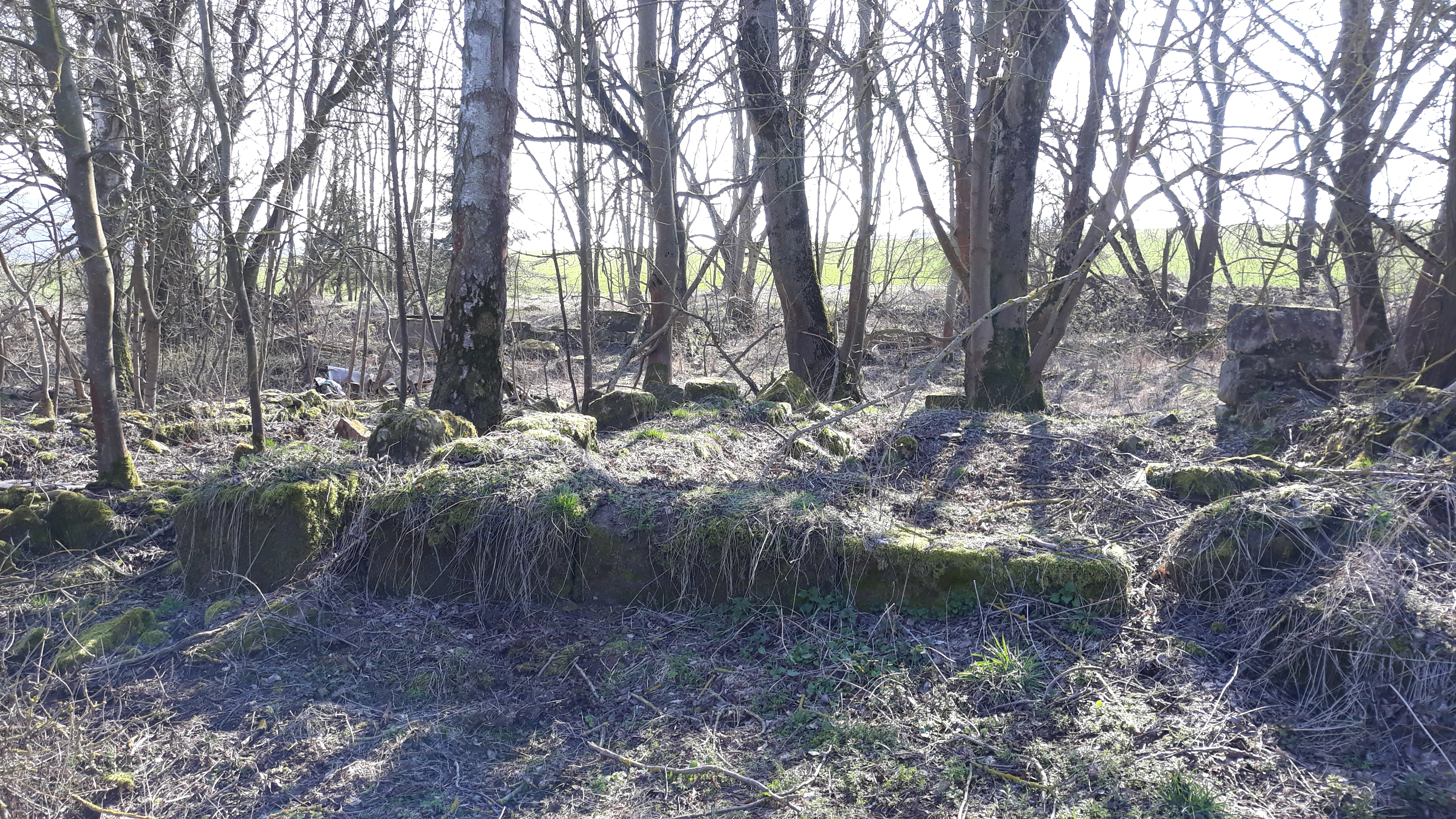 Überreste der Grundmauern